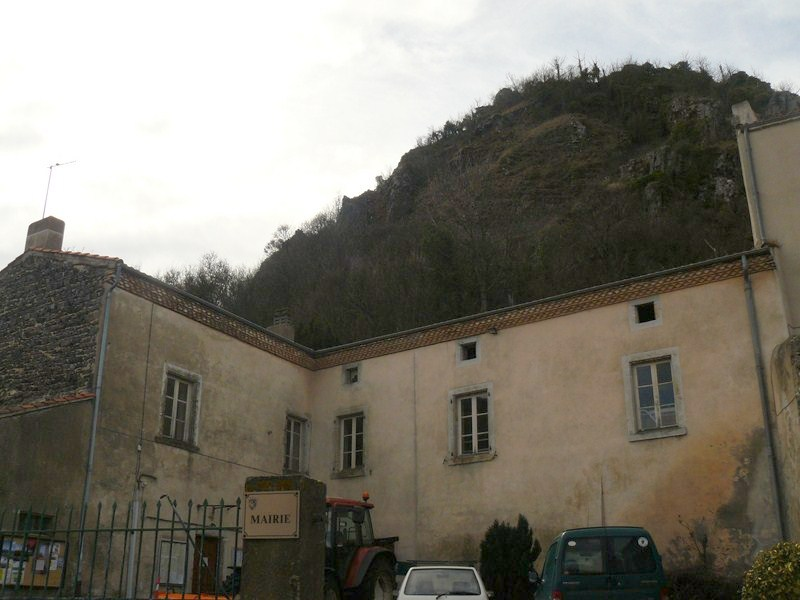 Mairie (ancienne école) de Vodable. On peut voir le Rocher qui surplombe la mairie.